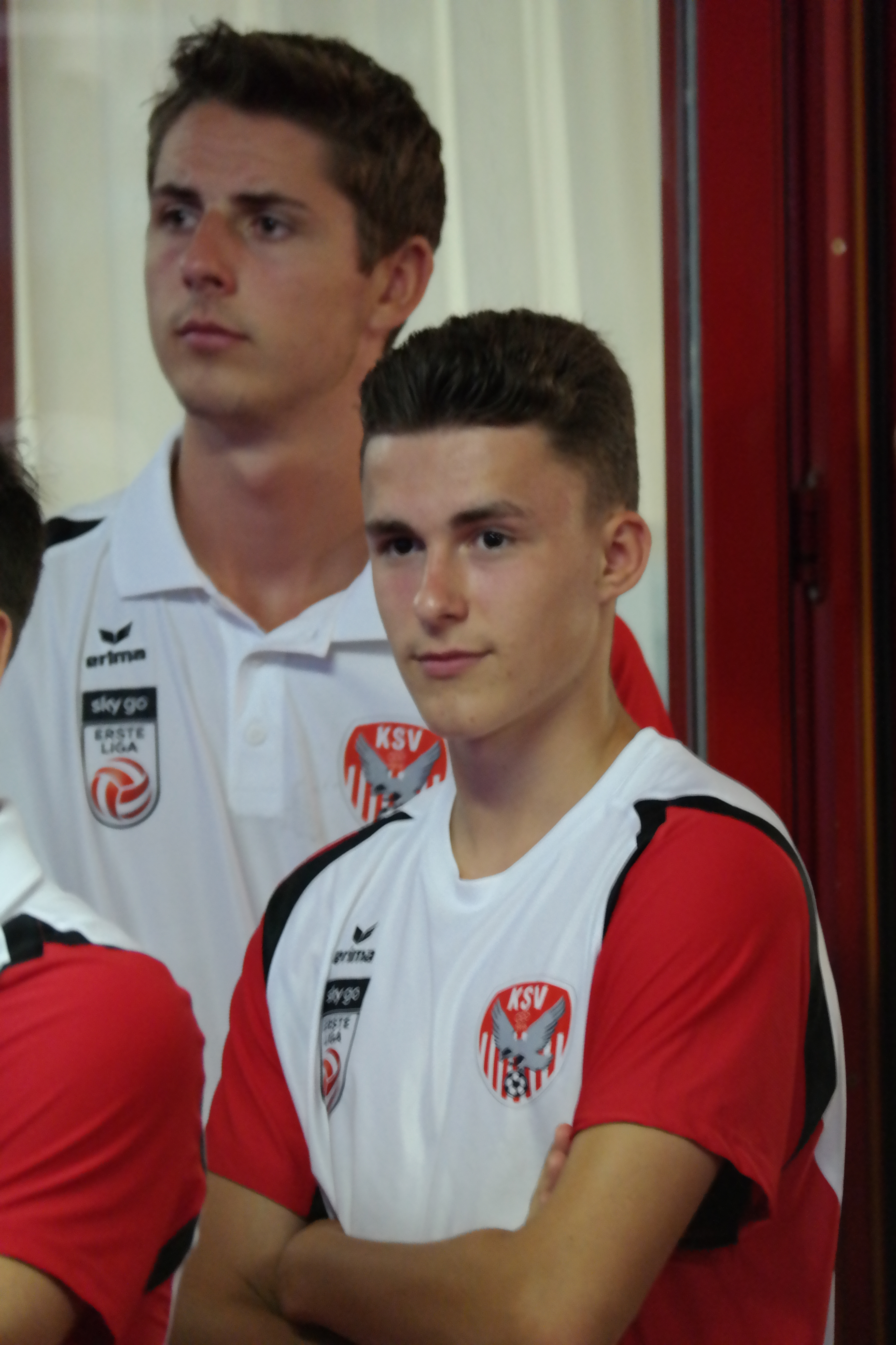 Mannschaftspräsentation der KSV im Juli 2017